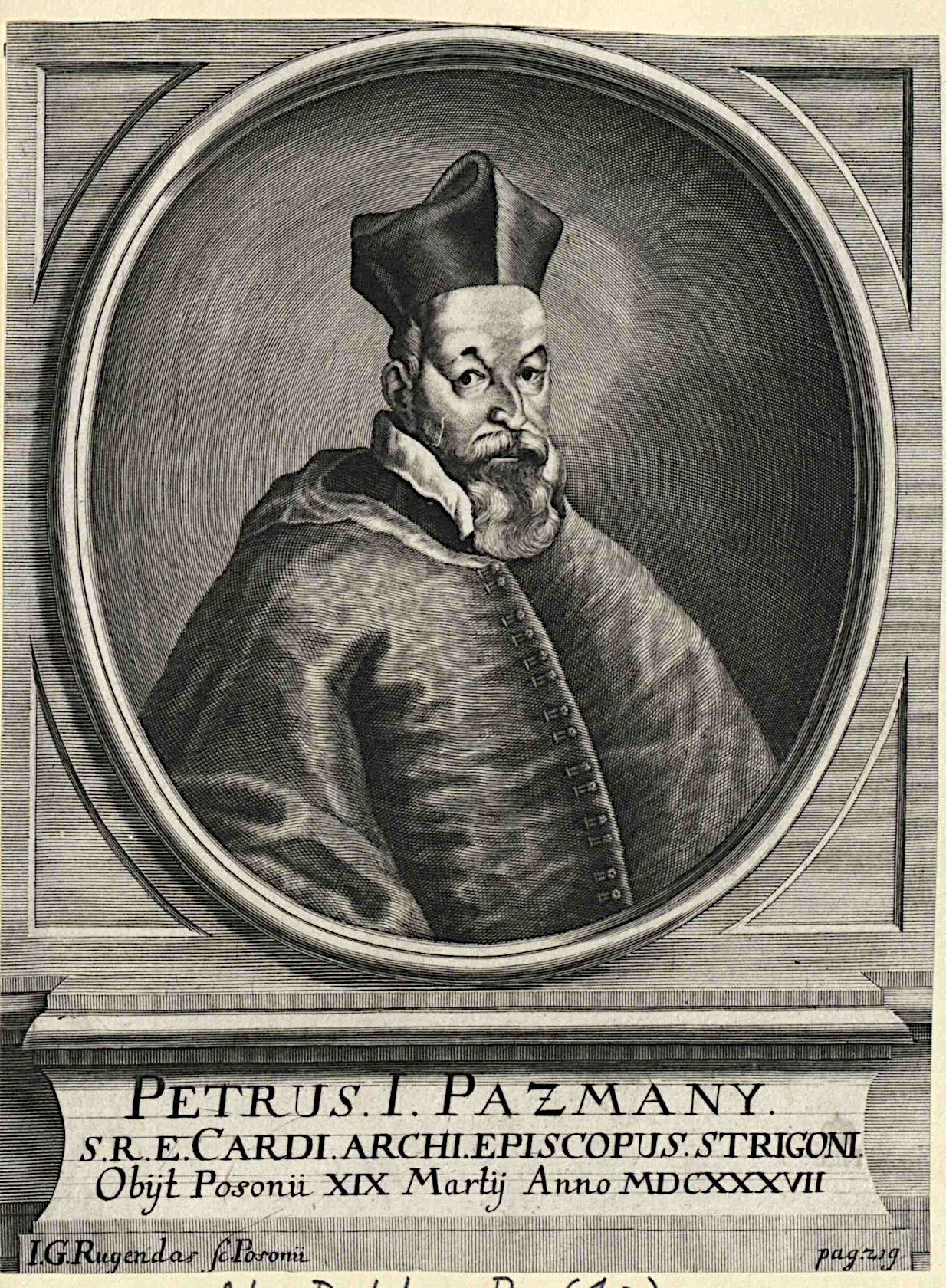 Pázmány Péter bíboros, esztergomi érsek, egyetemalapító portréja. Jeremias Gottlob Rugendas (1710–1772) rézmetszete